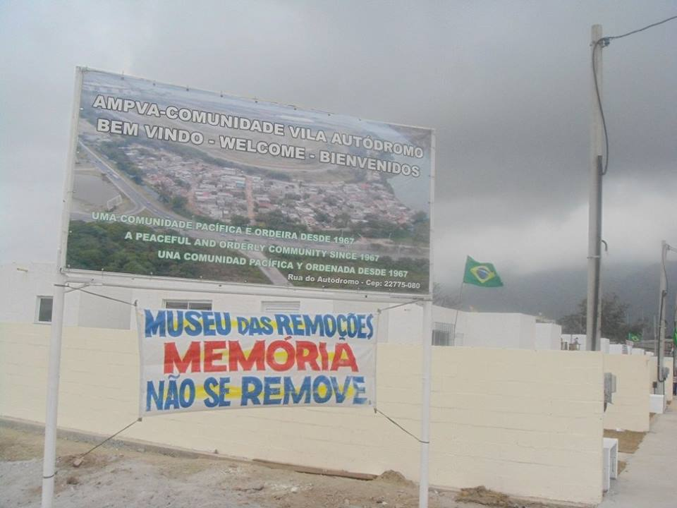 Placa na entrada da Rua Vila Autódromo com imagem aérea da Vila antes do período de remoções das Olimpíadas 2016. Abaixo da placa, faixa com a mensagem "Museu das Remoções: Memória não se remove".